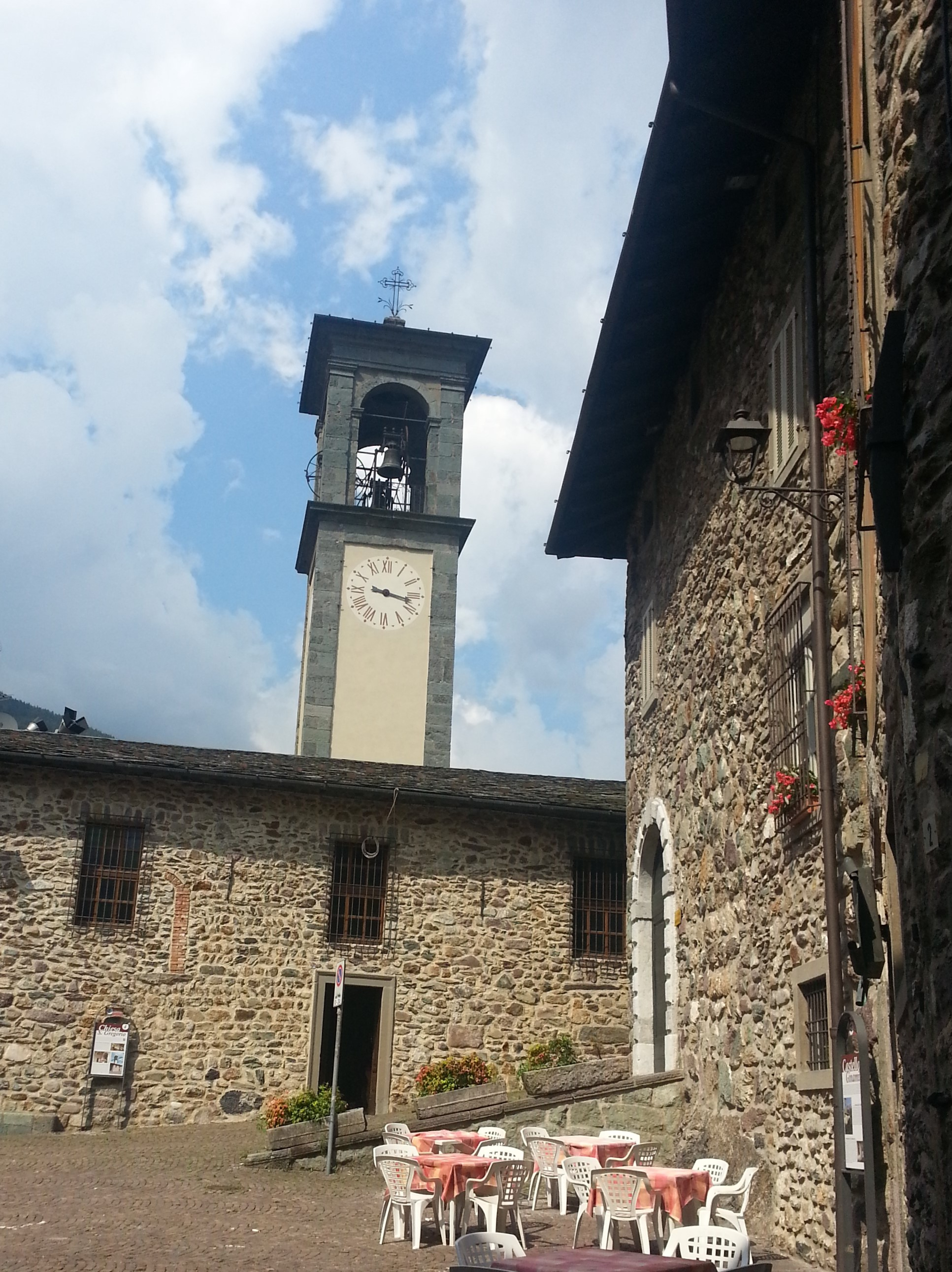 Palazzo Milesi e chiesa di san Gregorio